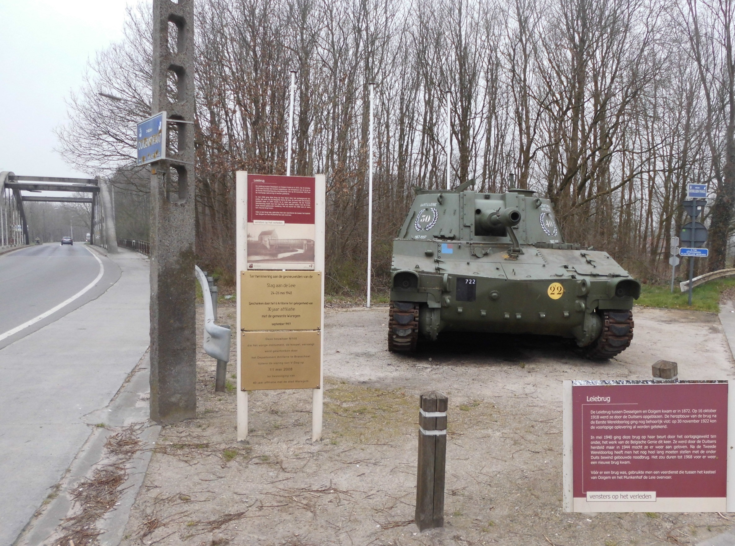 Leiebrug op de grens van Ooigem (Wielsbeke) met Desselgem (Waregem) - West-Vlaanderen - België